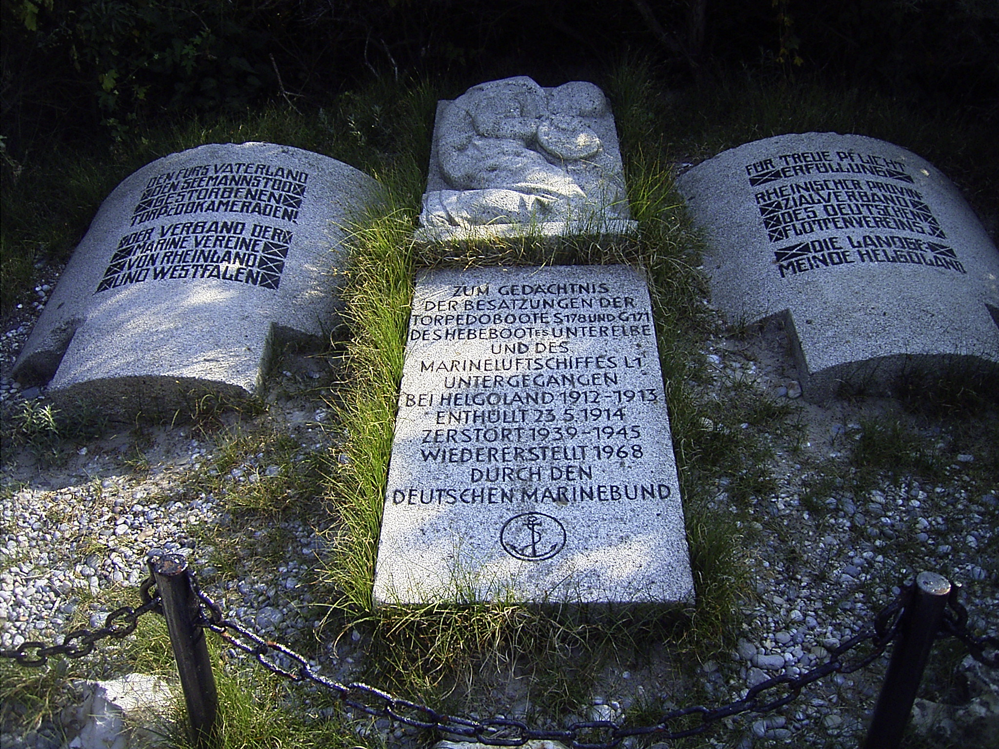 Düne Friedhof: Der Namenlosen Stein